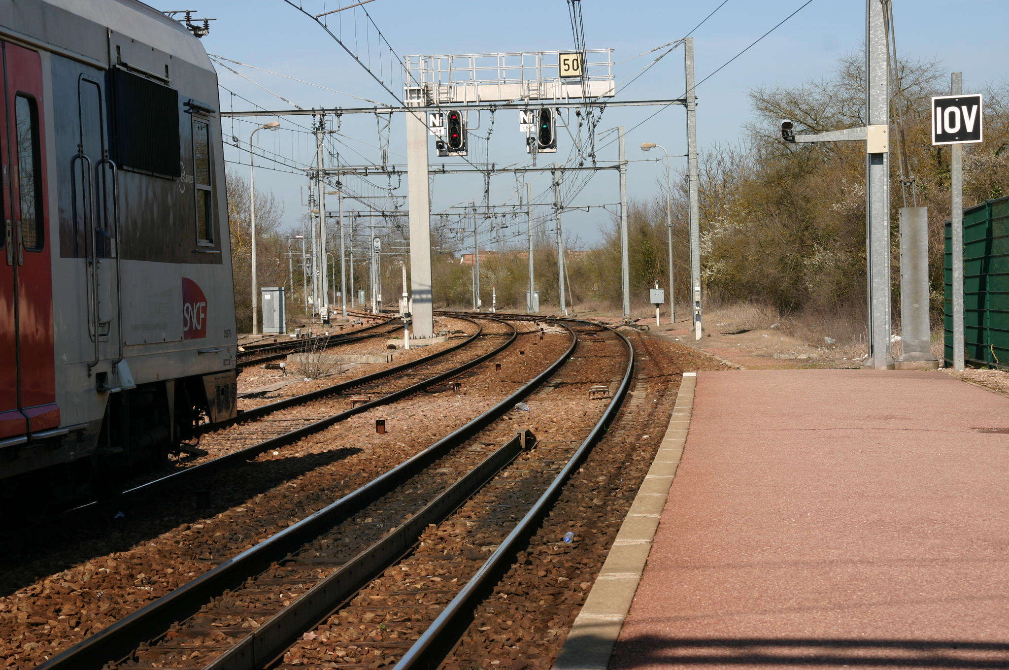 Gare de Malesherbes, Loiret (France)